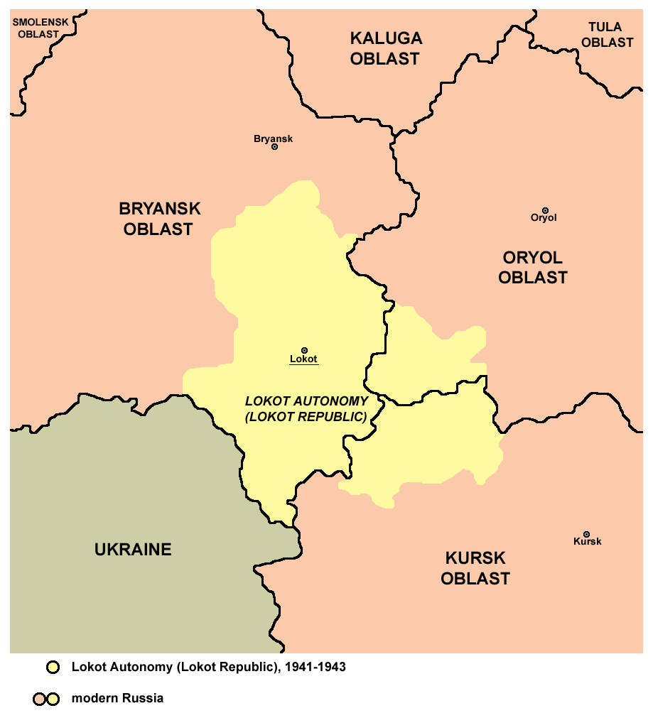 Lokot Autonomy (Lokot Republic) map, 1941-1943.